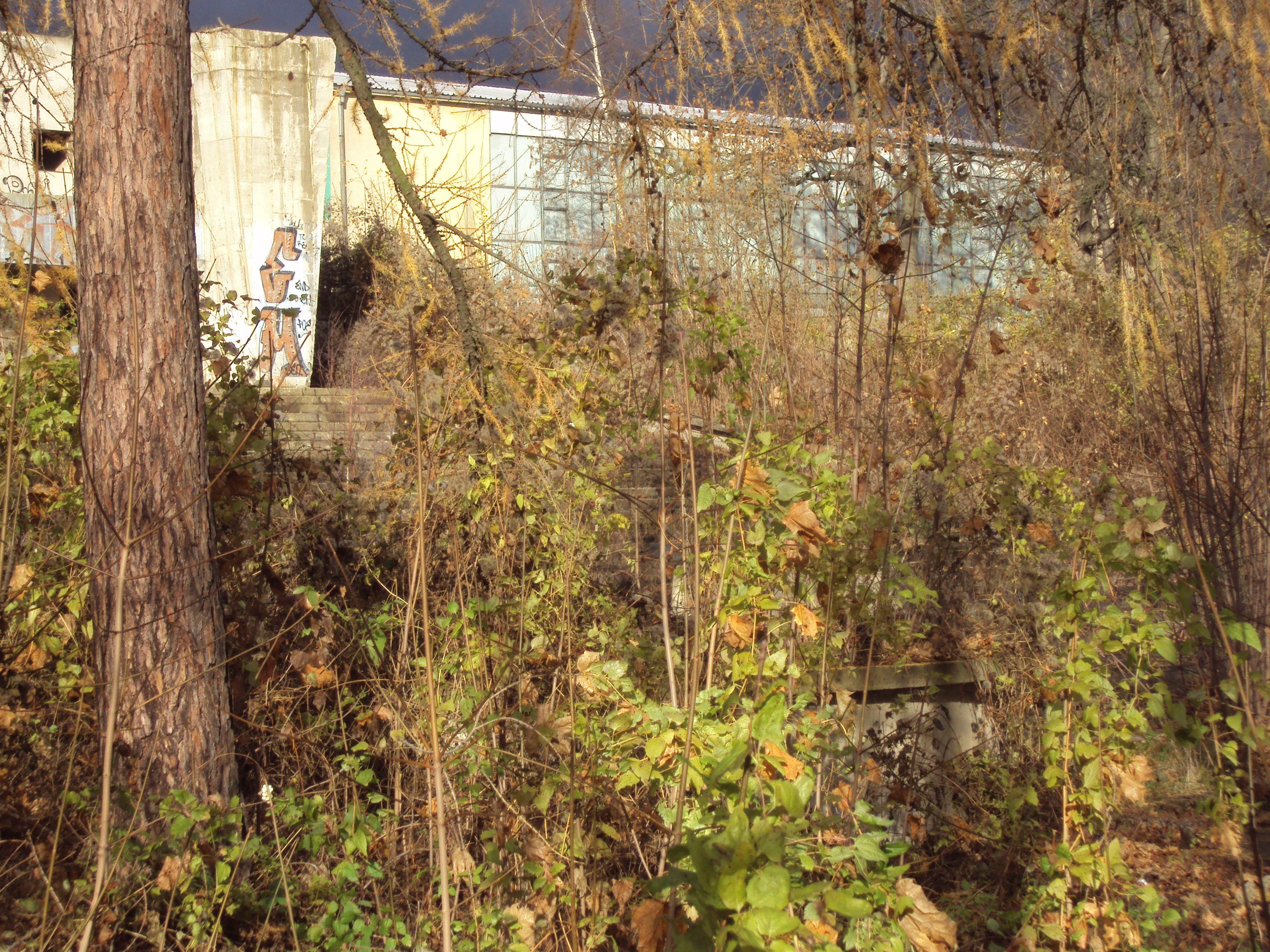 30 let opuštěný areál na vrchu Letná v Teplicích